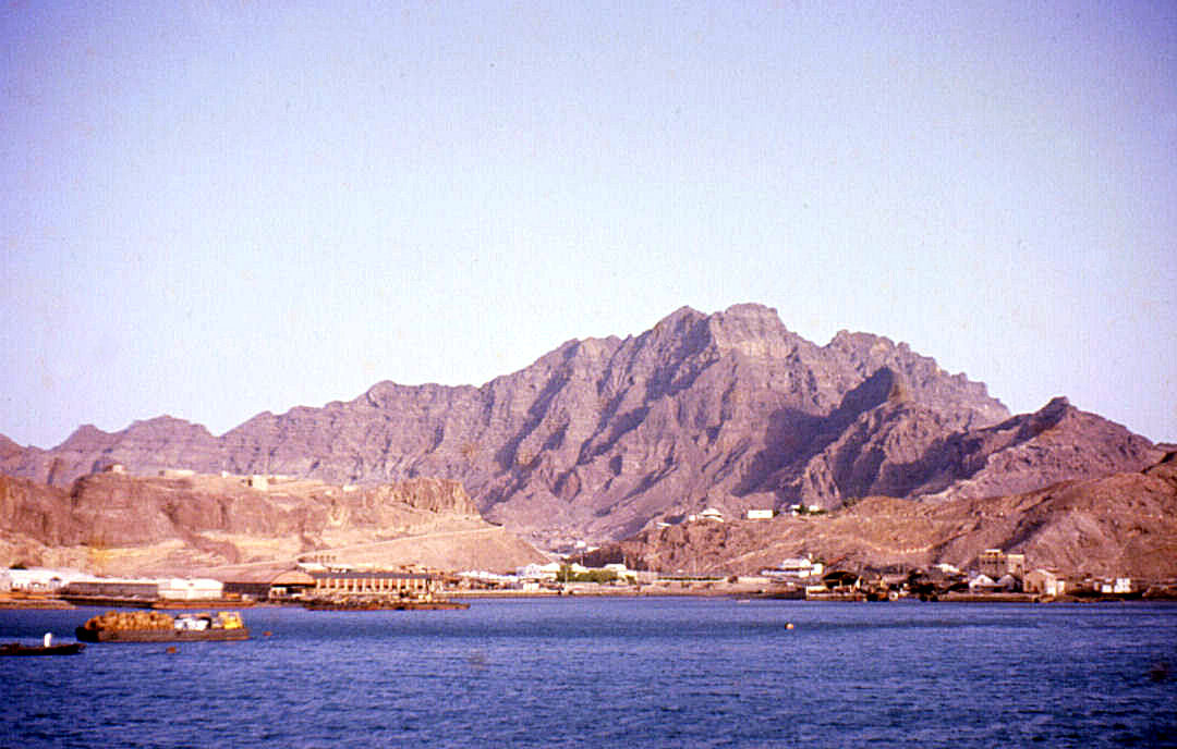 Aden 1960Aden 1960 8